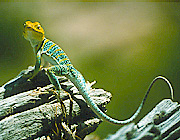 Crotaphytus collaris baileyi von Public Domain